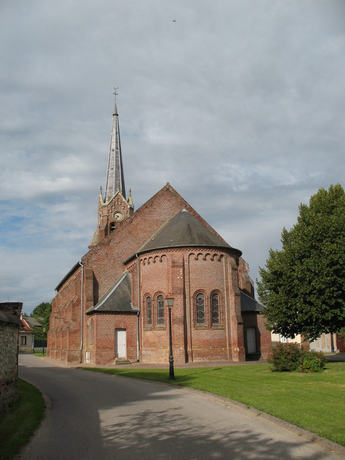 église de Saint-Gratien. Construction en briques. La tour clocher et la flèche d'inspiration néo-gothique, constrastent avec le style néo-roman de la nef et de l'abside.